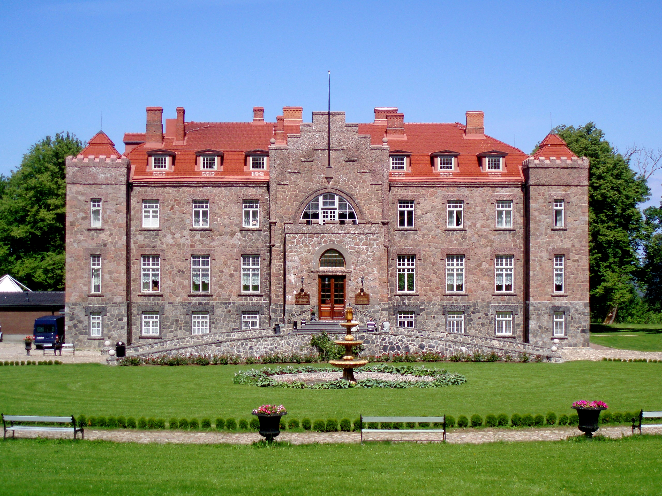 Kalvi mõisa peahoone, 1908-1912